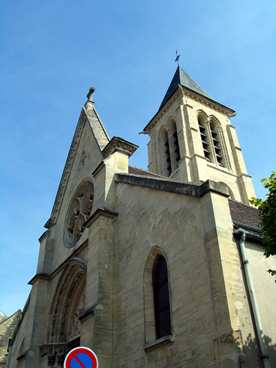 Cormeilles-en-parisis, l'église Saint-Martin. 2004 Jean-noël Lafargue